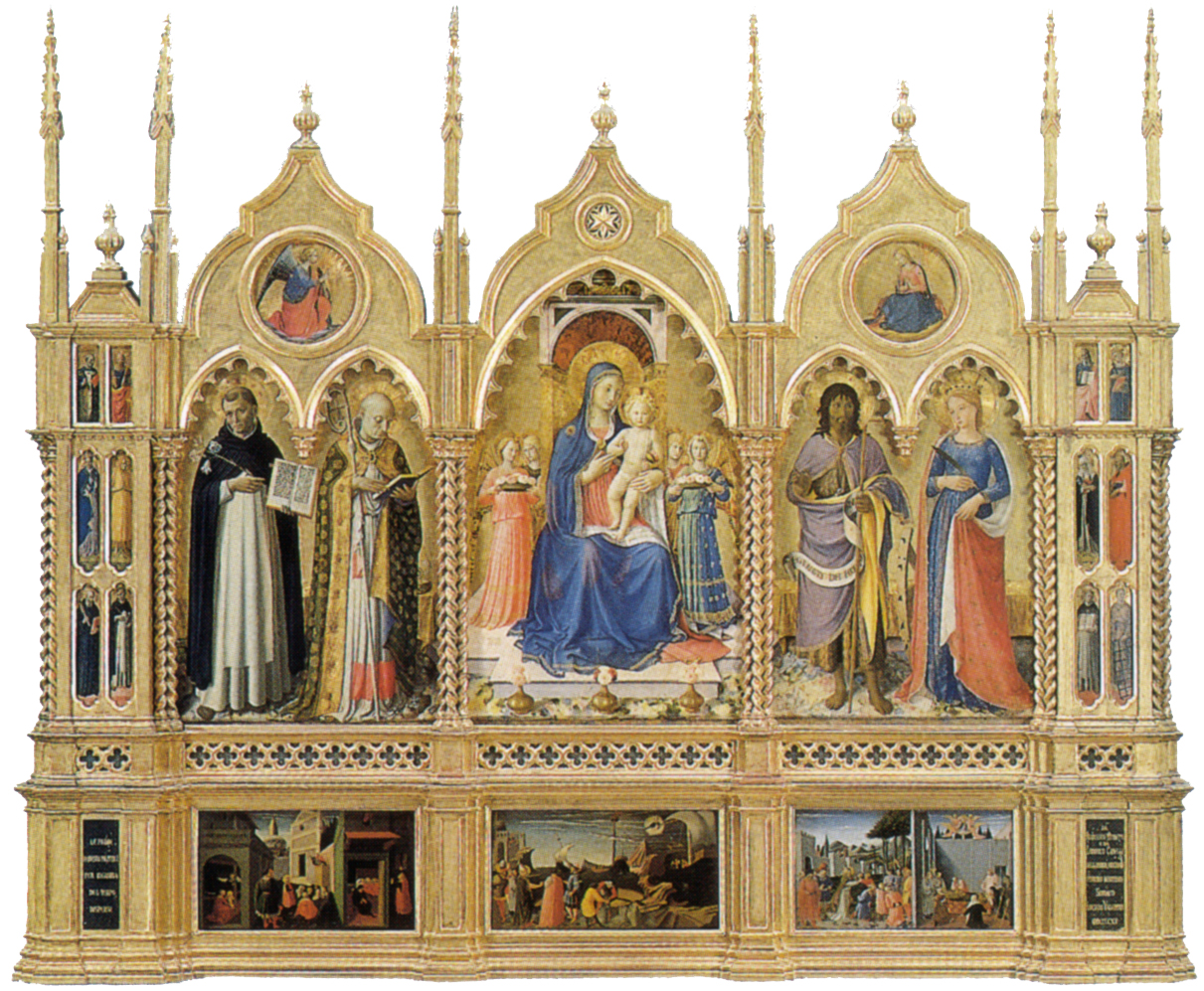 Madonna con Bambino in trono e angeli, San Domenico e san Nicola di Bari, San Giovanni Battista e santa Caterina d'Alessandria, Annunciazione, Santi, Storie della vita di san Nicola di Bari